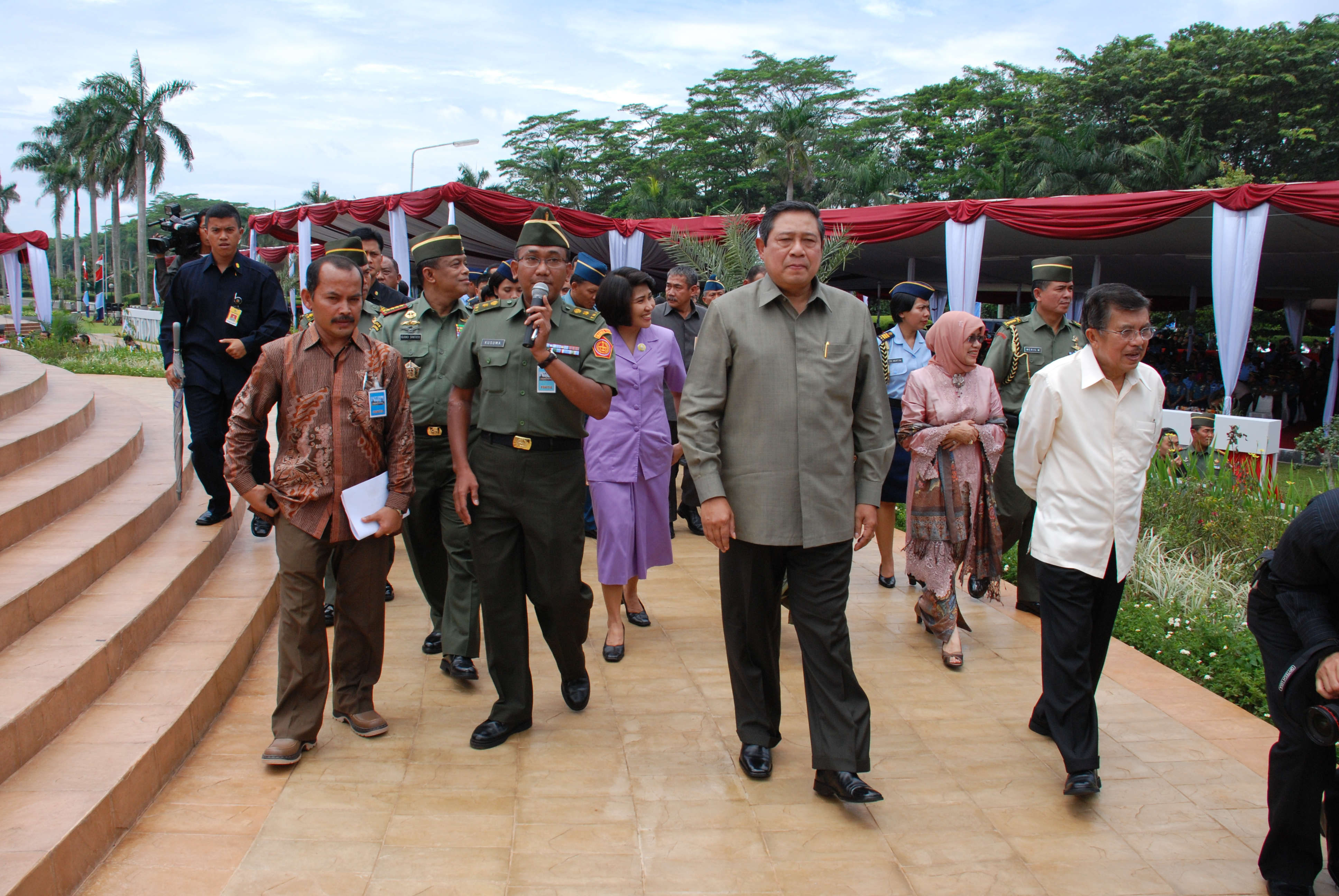 Peresmian Karya Yusman Monuman Dwikora dan Trikora di MABES TNI Cilangkap oleh Presiden R.I Susilo Bambang Yudhoyono tahun 2009